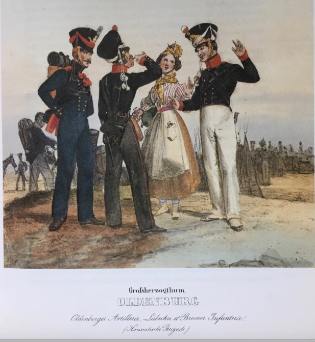 Altkolorierte Lithographie aus Heinrich Ambros Eckert und Dietrich Monten: Das deutsche Bundesheer in charakteristischen Gruppen 1838